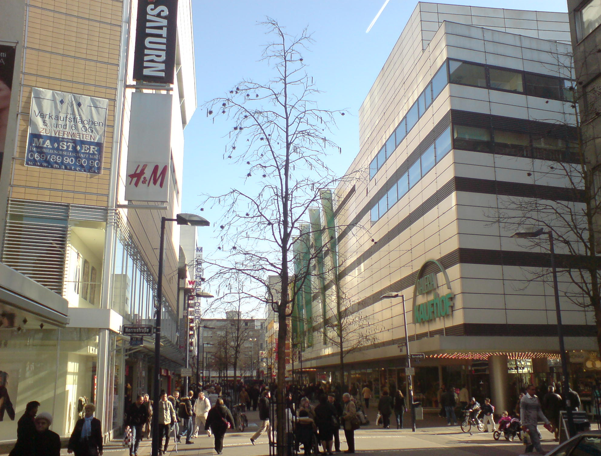 Die Frankfurter Straße in Offenbach am Main, Blick Richtung Marktplatz